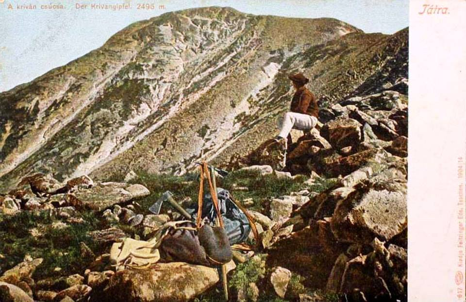 dobová fotografia z výstupu na Kriváň- horský vodca